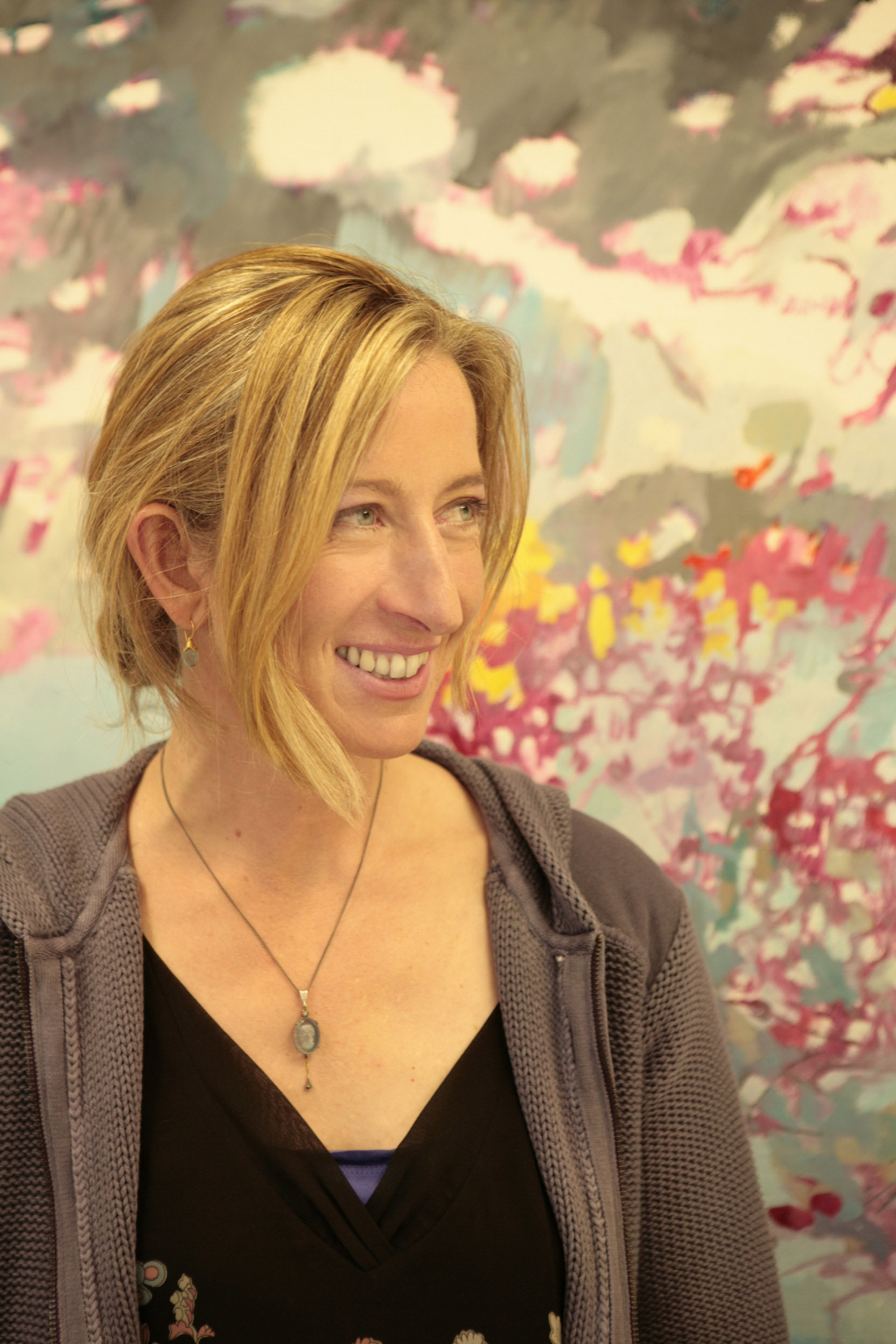 Portraitfoto von Gisela Krohn